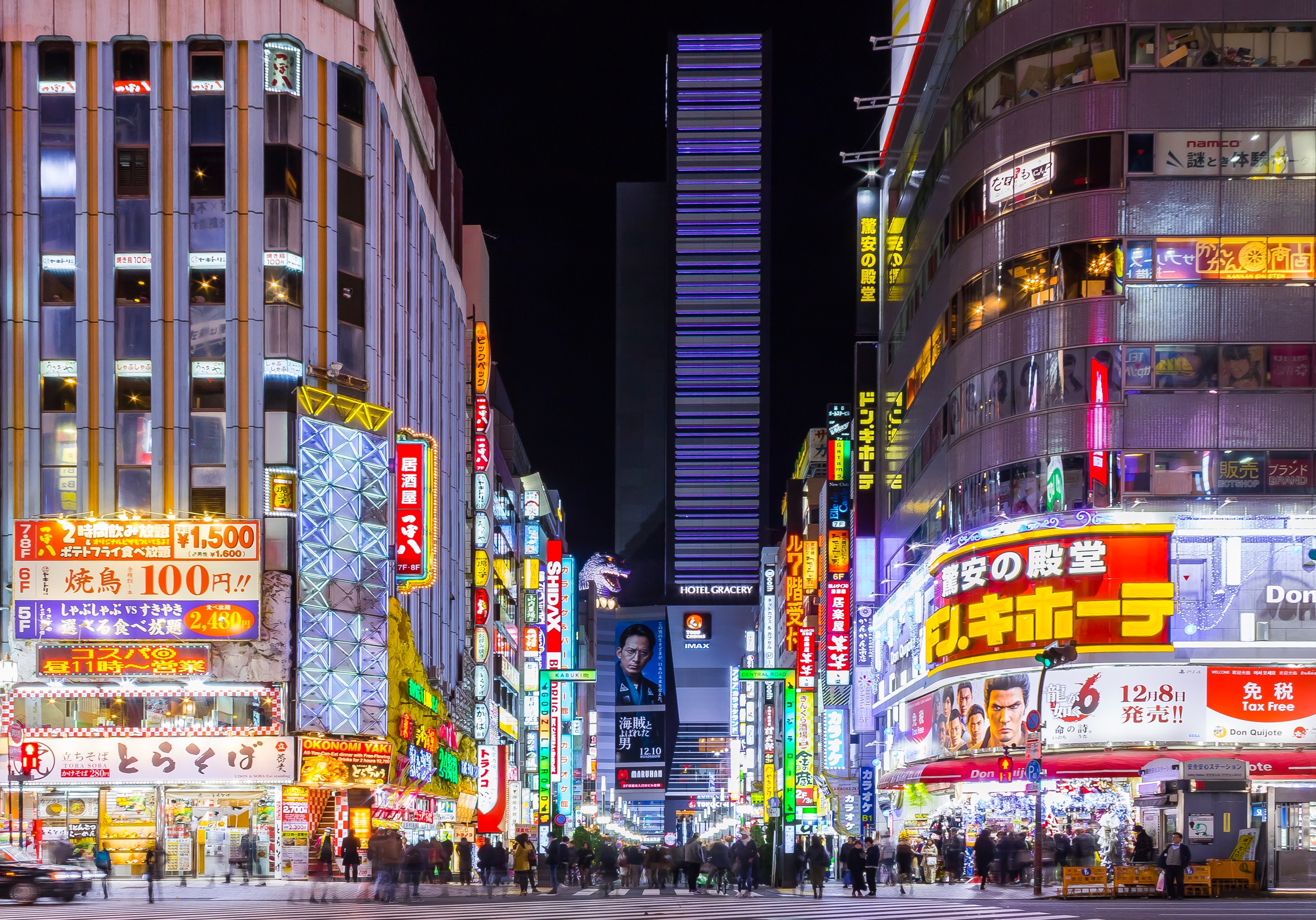 歌舞伎町セントラルロード(ゴジラロード)、奥は新宿東宝ビル。